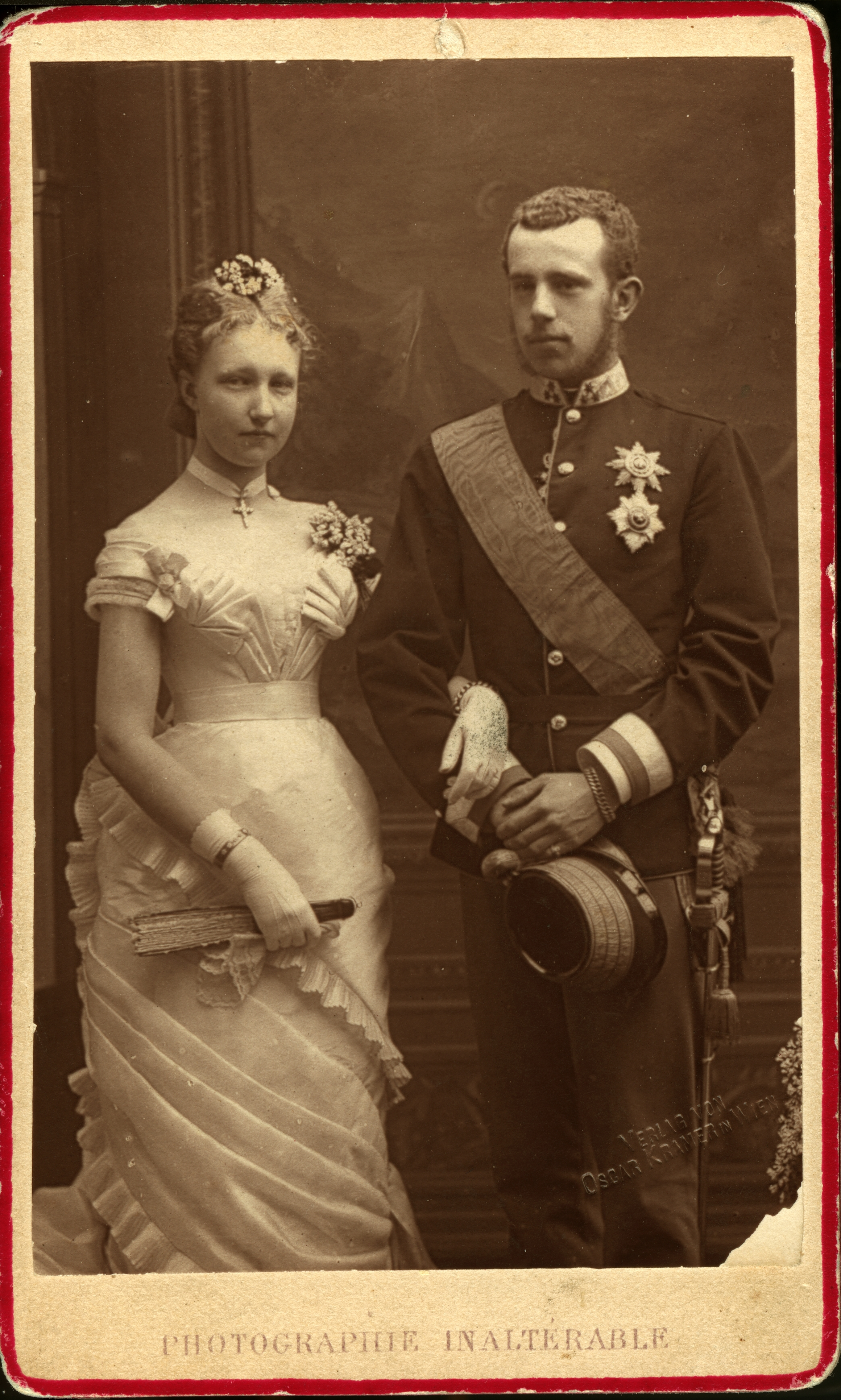 Stefanie und Rudolf, Porträtaufnahme des Kronprinzenpaares anlässlich der Hochzeit